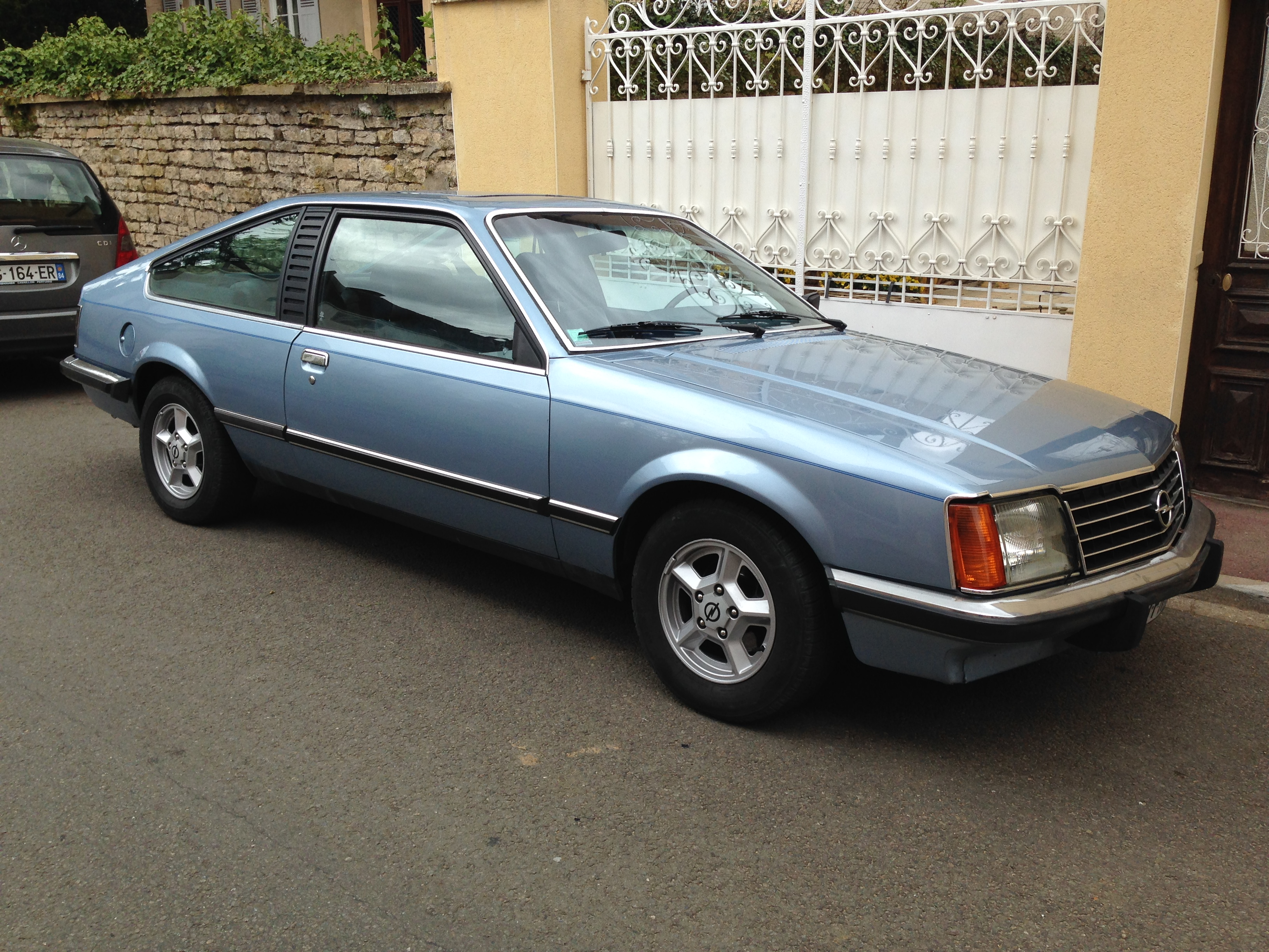 Monza A1 3.0E (1980)